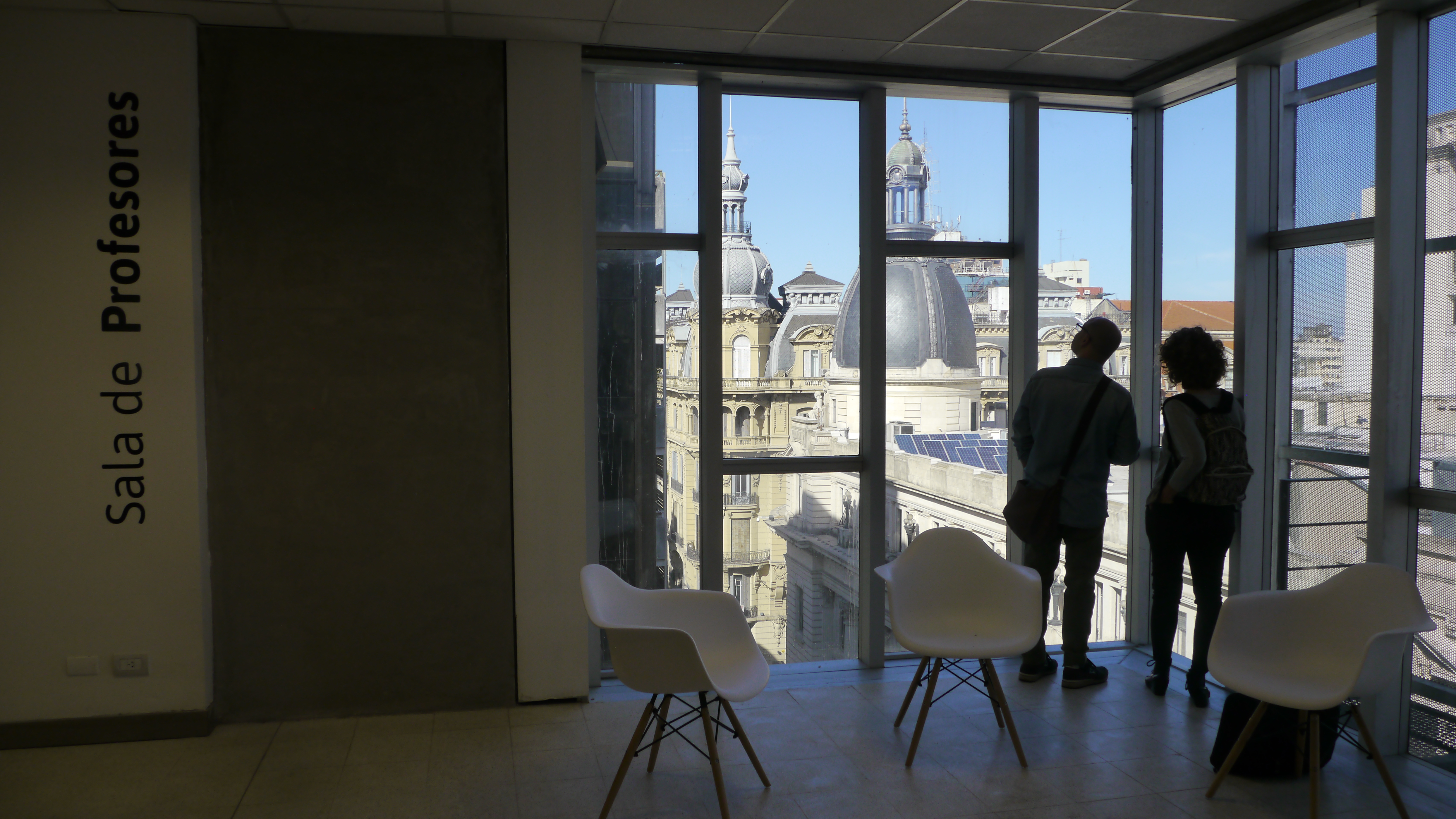 Facultad de Humanidades y Artes (ventana)